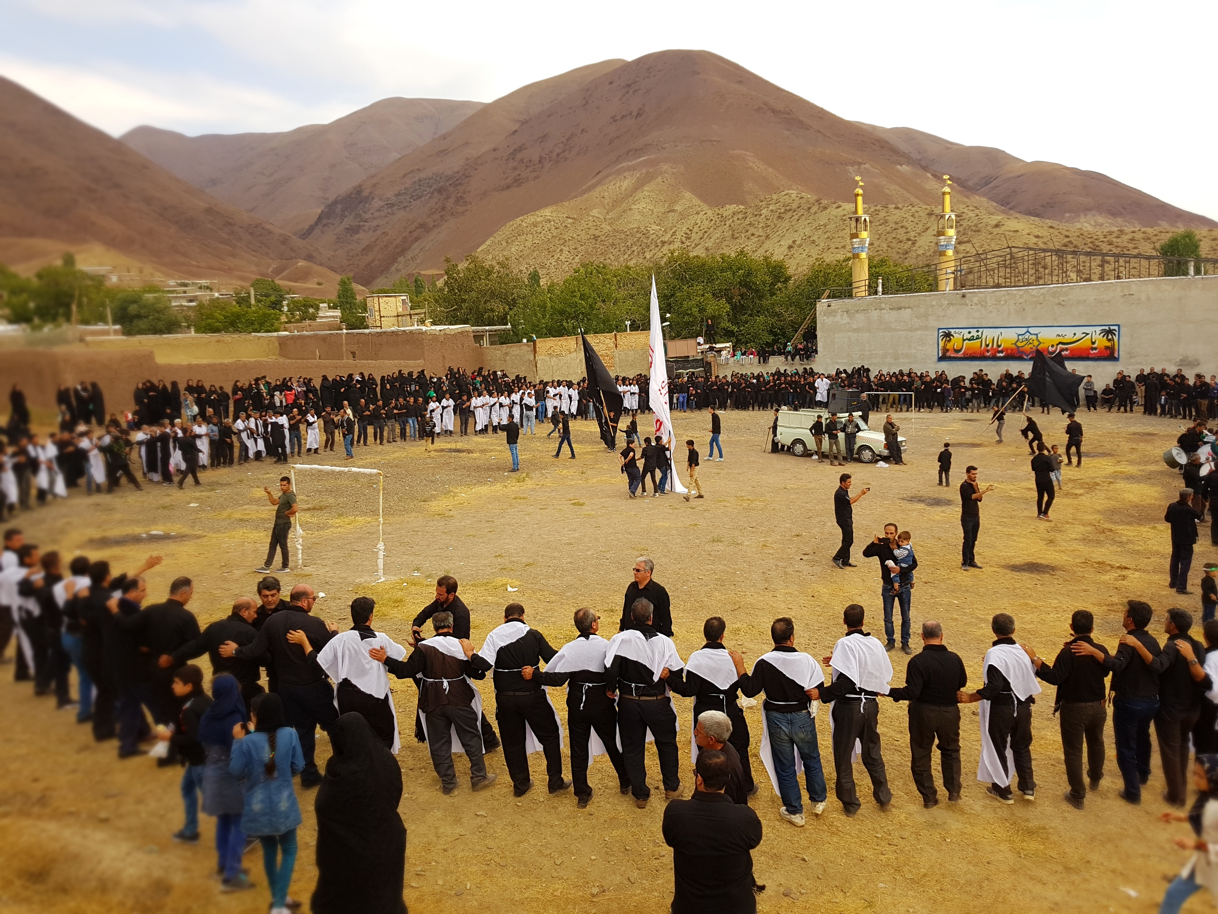 هر ساله تعدادی از اهالی روستا و افراد شهر های دیگر در روز عاشورا و تاسوعا دسته شاه حسین گویان تشکیل میدهند. عکاس:طاها علیمردانی